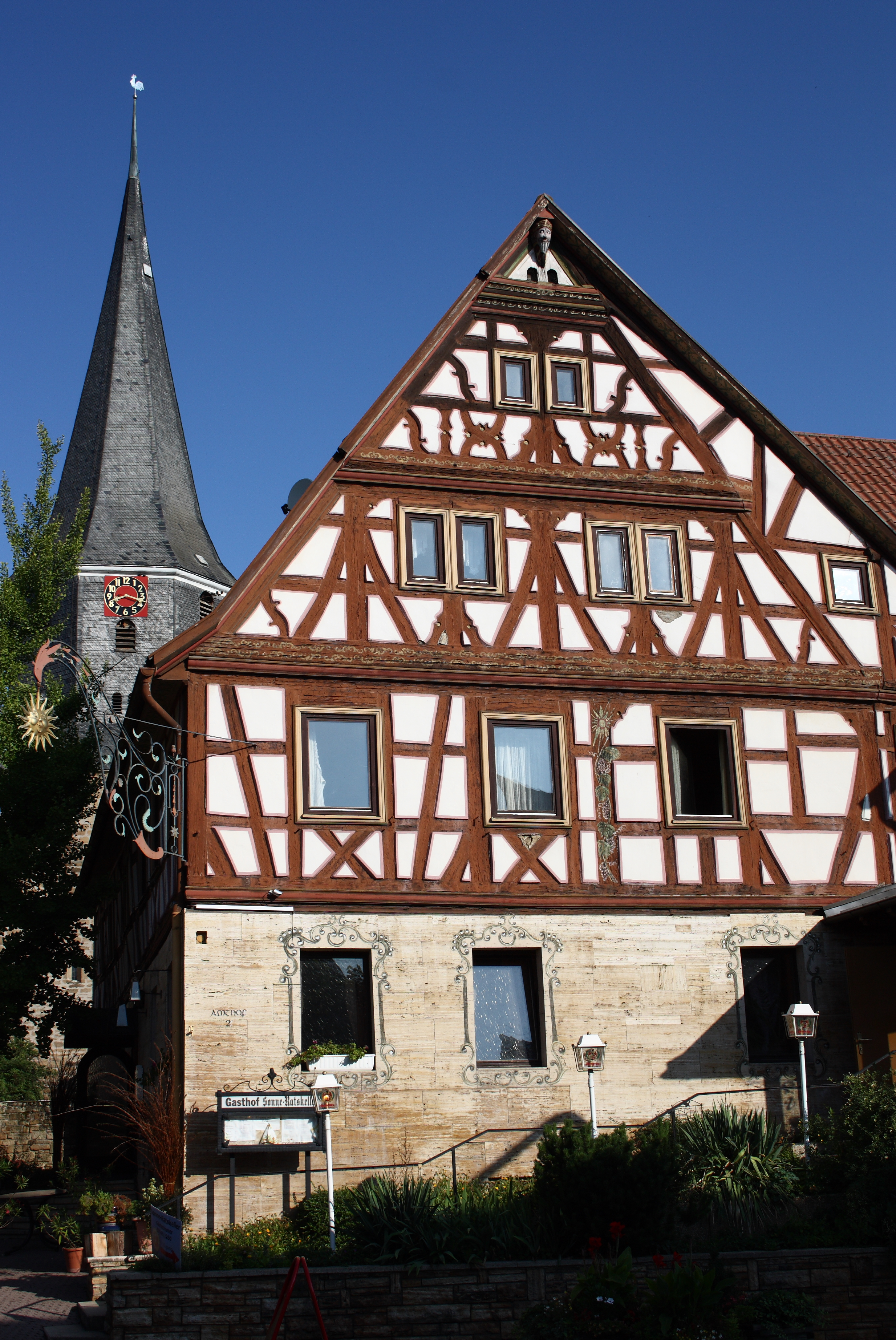 Gasthaus Sonne in Oberderdingen, Amthof 2